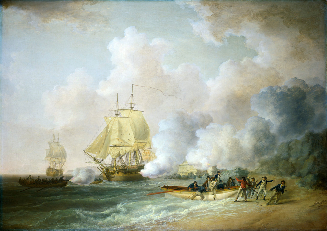 Capture de Fort Louis par les Anglais, lors de l'invasion de la Martinique, le 20 mars 1794. Le navire au premier plan est le HMS Zebra, ouvrant le feu et on puet distinguer à l'arrière plan le vaisseau de 64 canons HMS Asia.